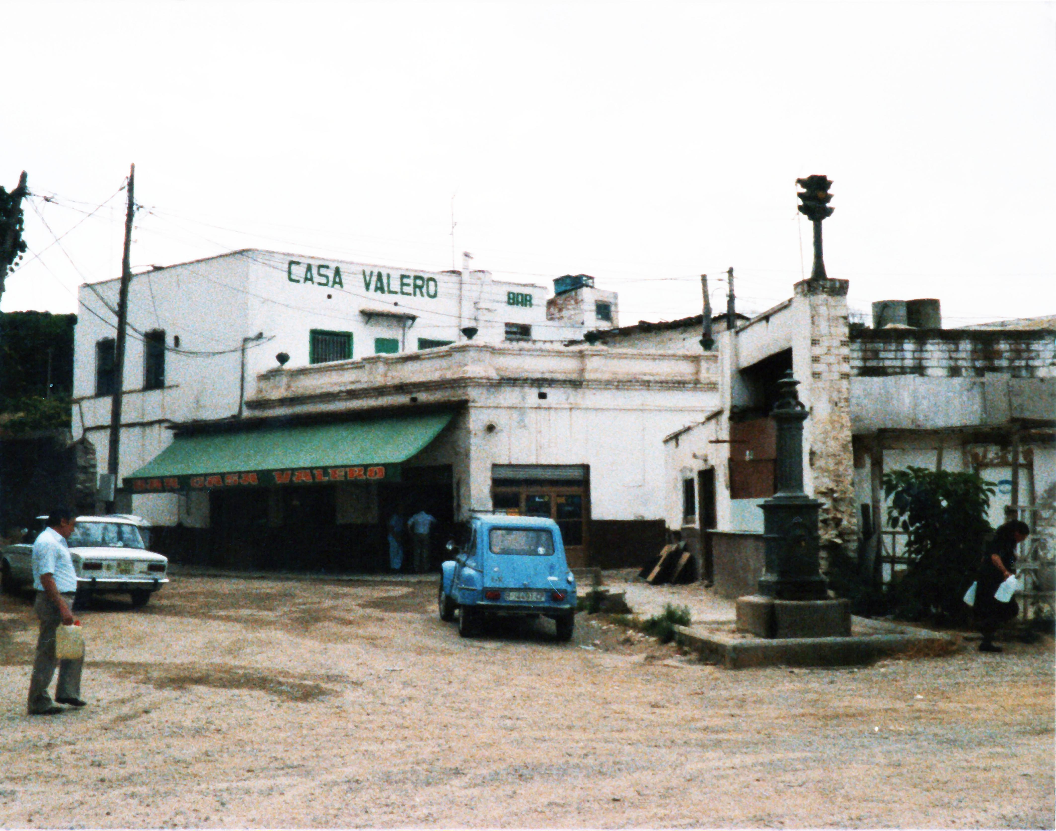 1987-Montjuic. Can Valero. una taverna entre els carrers Can Valero Gran, carrer Antic de la Animete i carrer Nit i Dia.